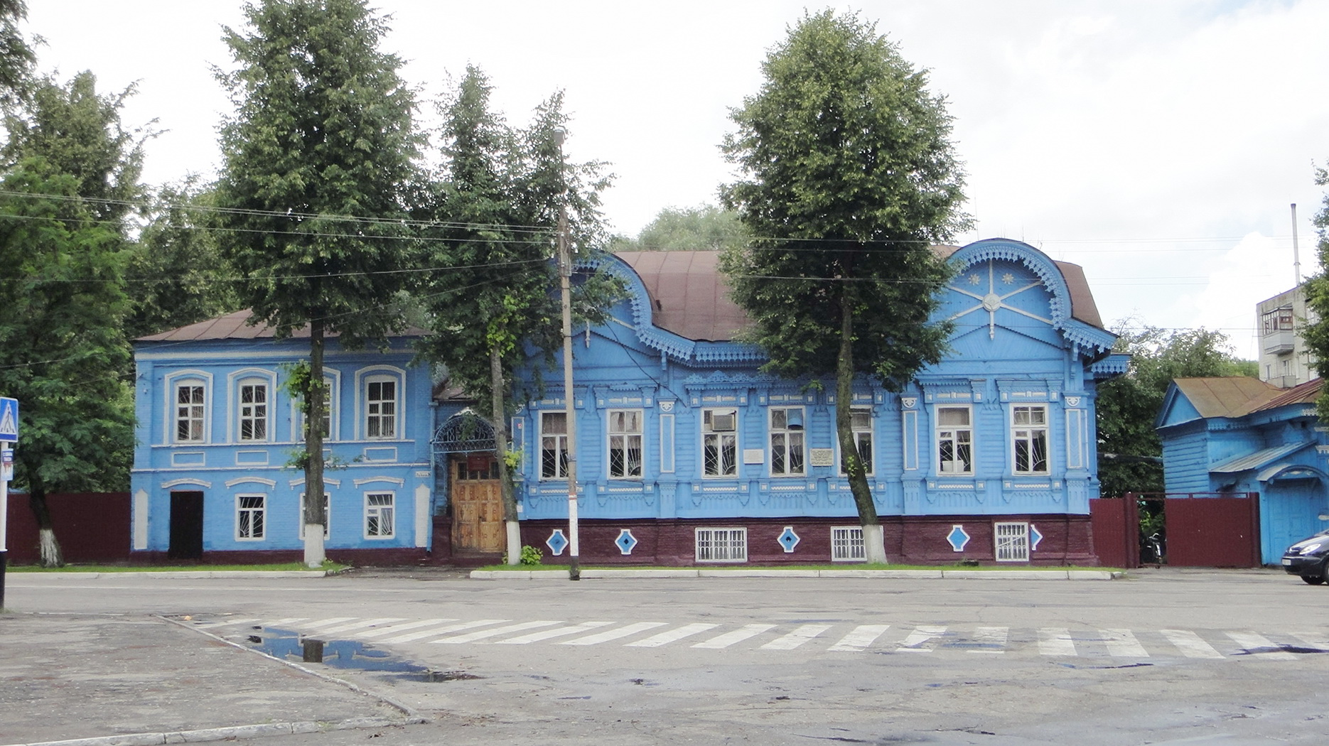 (Брянская область, Новозыбков, улица Ленина, 12)